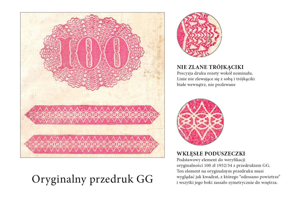 Oryginalny przedruk GG 100 złotych 1932 albo 1934